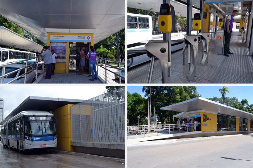 BRT Via Livre — Recife, Pernambuco, Brasil.